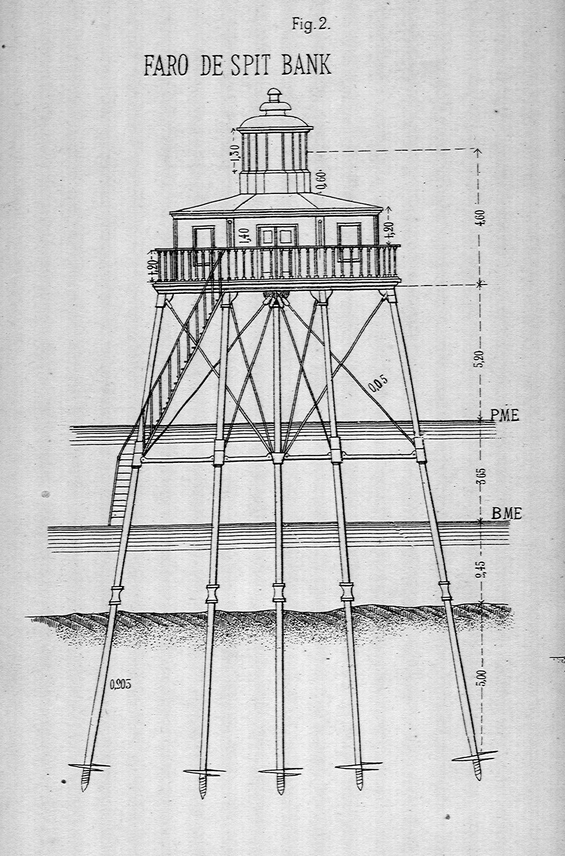 Faro de Spit Bank (diseñado por Alexander Mitchell ) según dibujo de José Eugenio Ribera